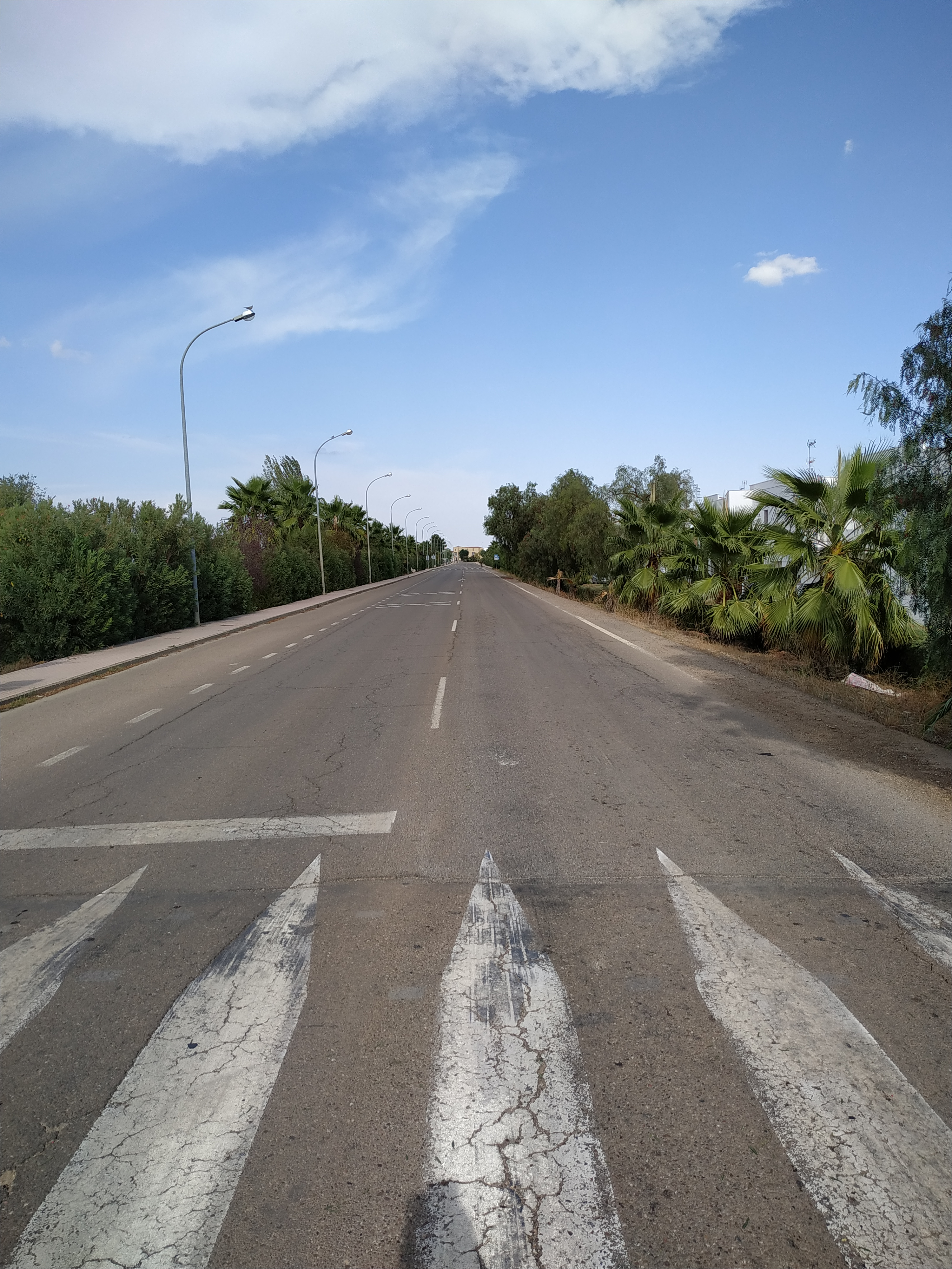 Carretera EX-202 a su paso por Bienvenida (Badajoz)